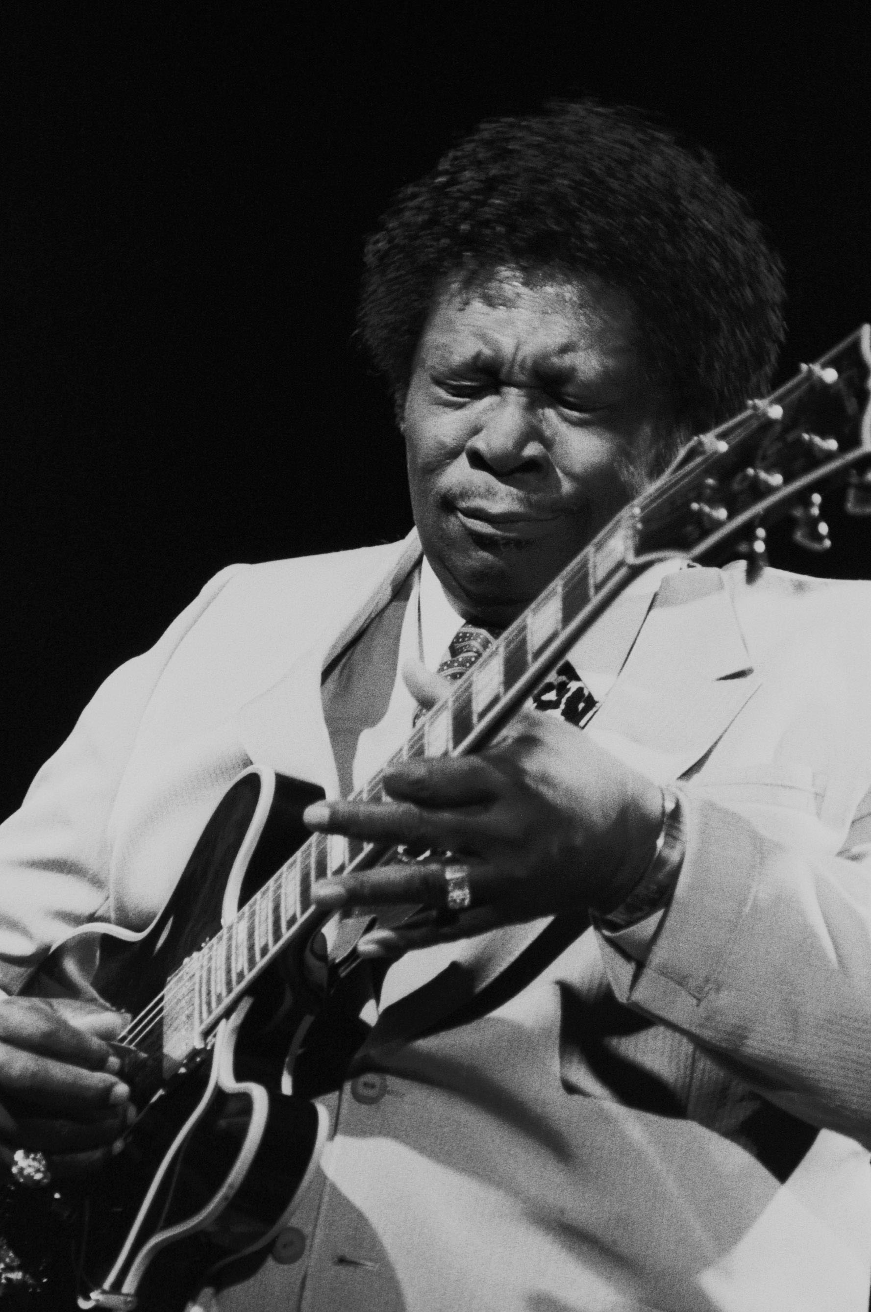 Il chitarrista blues B.B. King